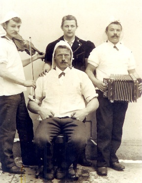 Gigler Blum, Franz Betschart, Unbekannt und Josef Stump. Franz Betschart war Schwingerkönig und ein Zirkusartist im Schweizer Nationalzirkus im Jahre 1900.